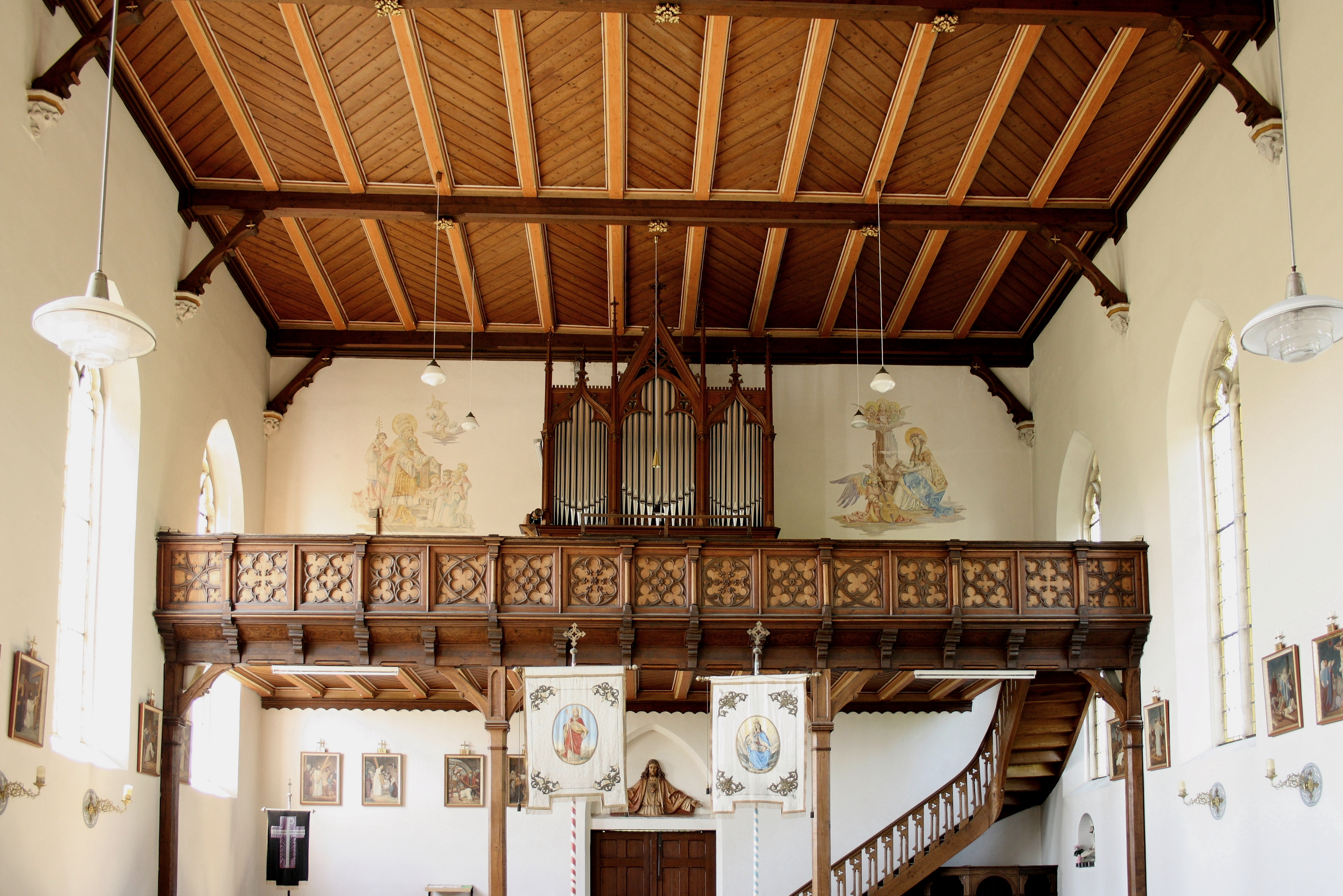 Katholische Pfarrkirche St. Martin in Staufen (Gemeinde Syrgenstein) im Landkreis Dillingen an der Donau, Empore